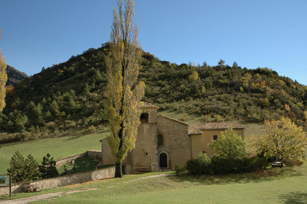 Commune de Rochefourchat. Cette commune est la plus petite commune de France et ne compte que deux habitants.